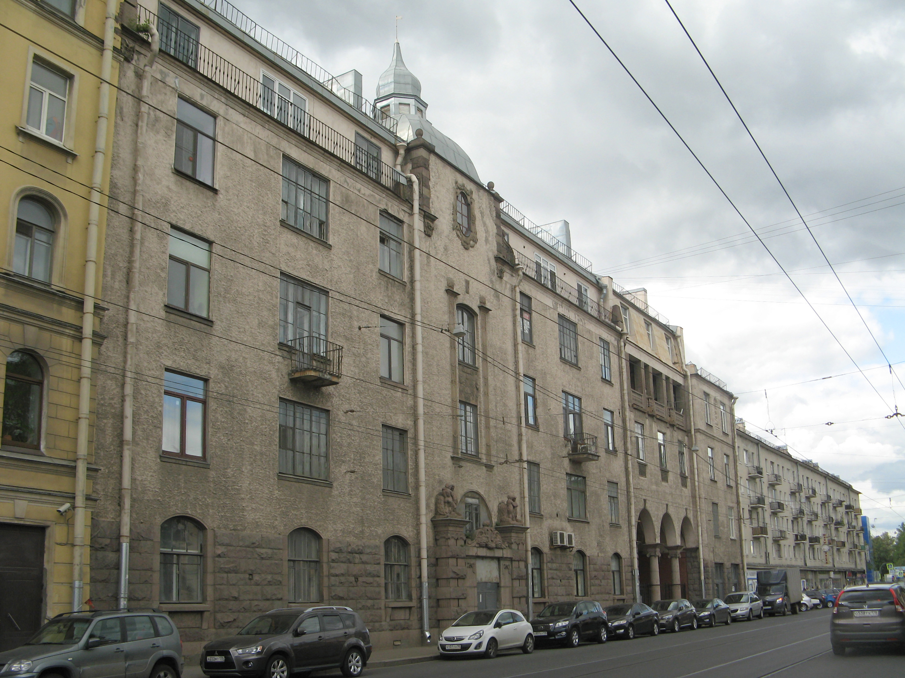 Жилой городок для служащих завода Л. Нобеля. Корпус № 8: проспект Большой Сампсониевский, 27, Лесной проспект 20, кор. 8, Выборгский район, Санкт-Петербург